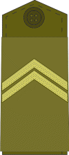 Serbian military ranks and insignia